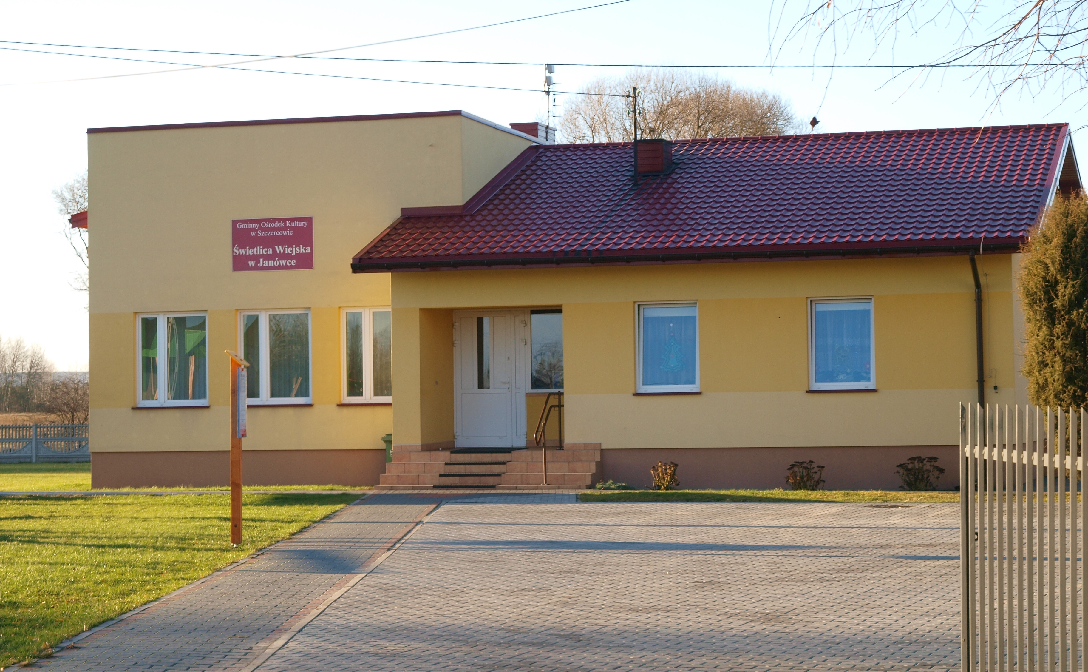 Janówka -szkoła